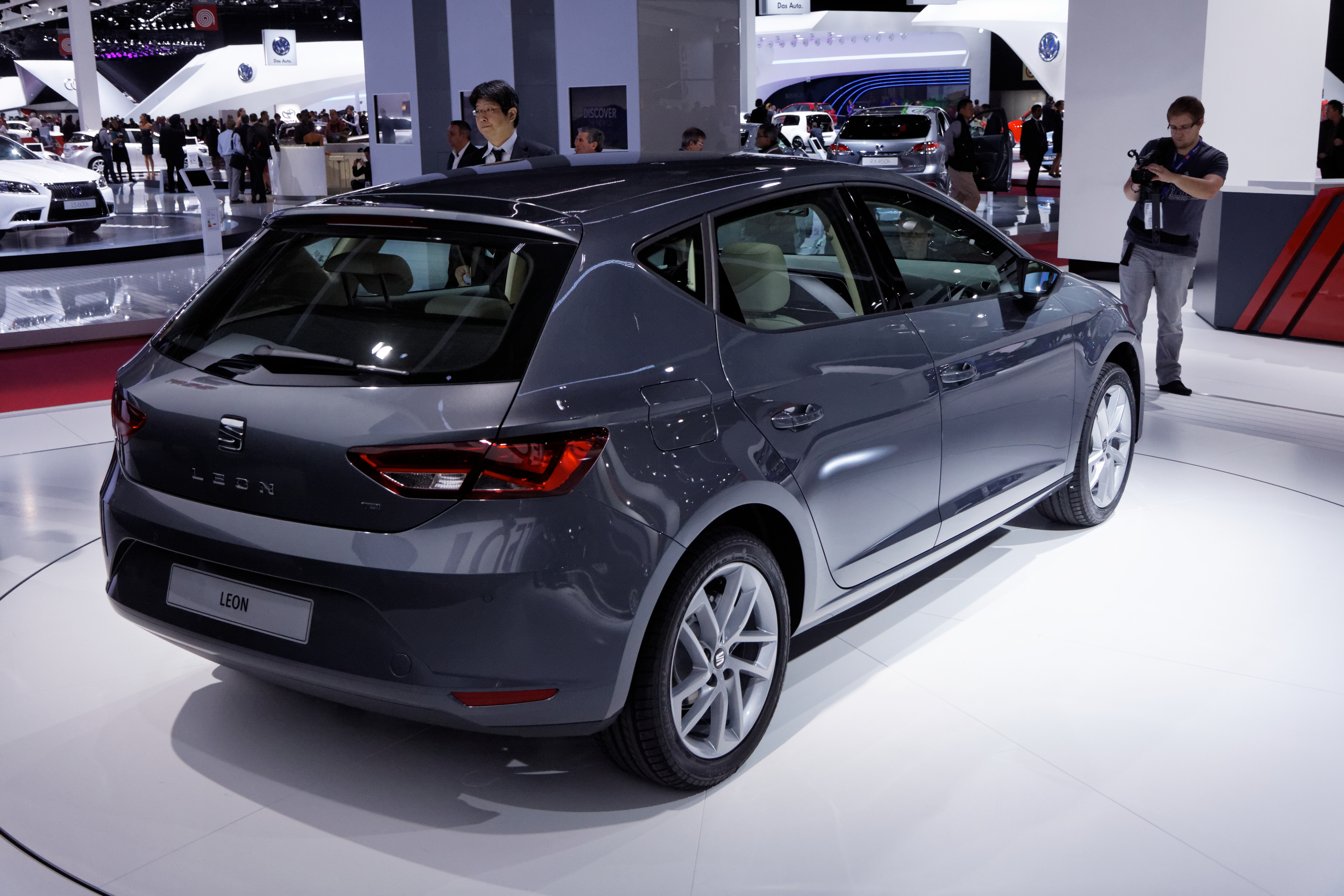 Une Seat Leon présentée lors du Mondial de l'Automobile de Paris 2012.